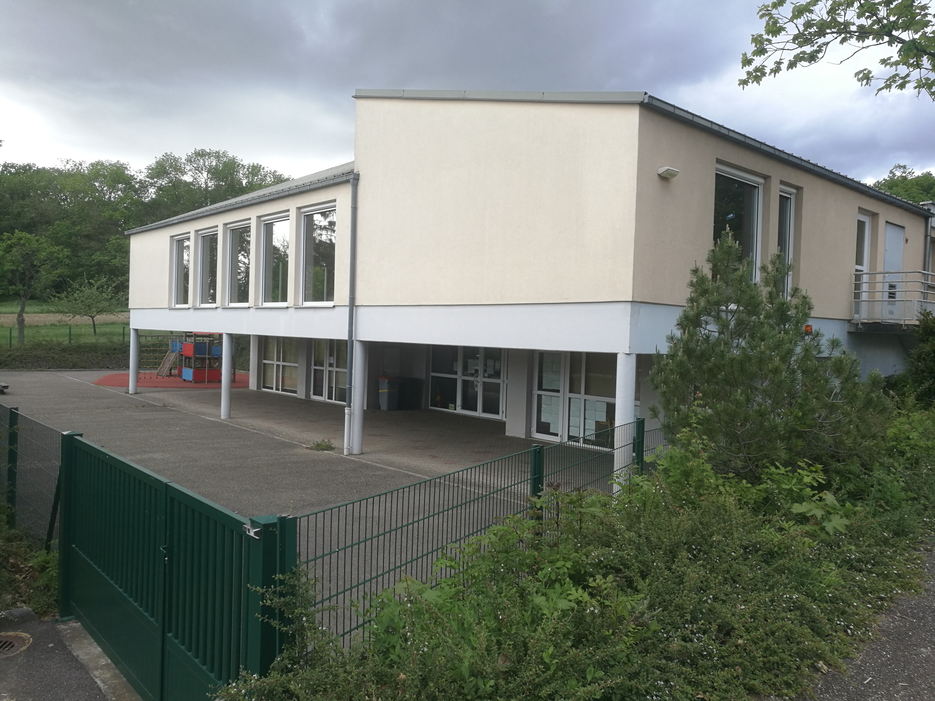 Salle des fêtes de Gougenheim